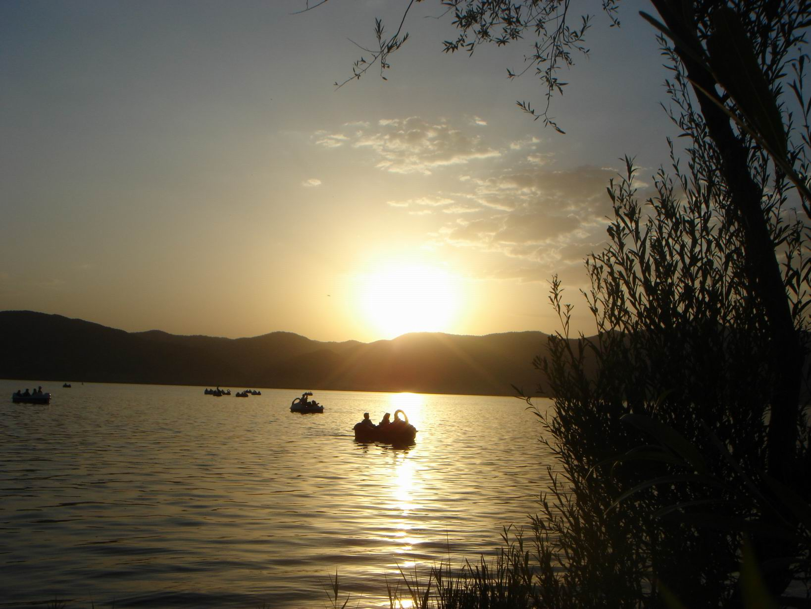 Zarivar Lake - Marivan -Iran عکاس علی افضلی